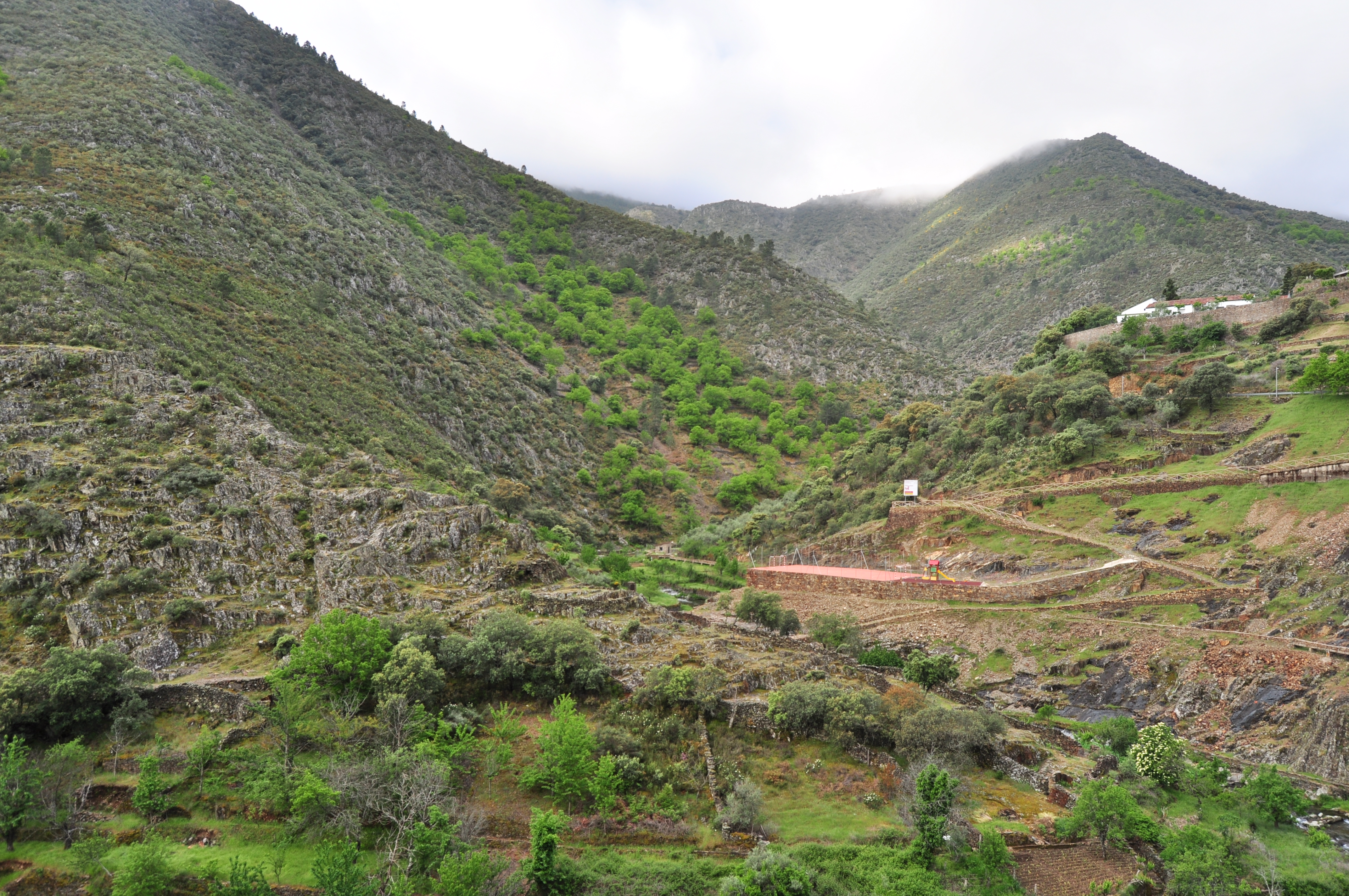 Martinlandran (Nuñomoral) - 006